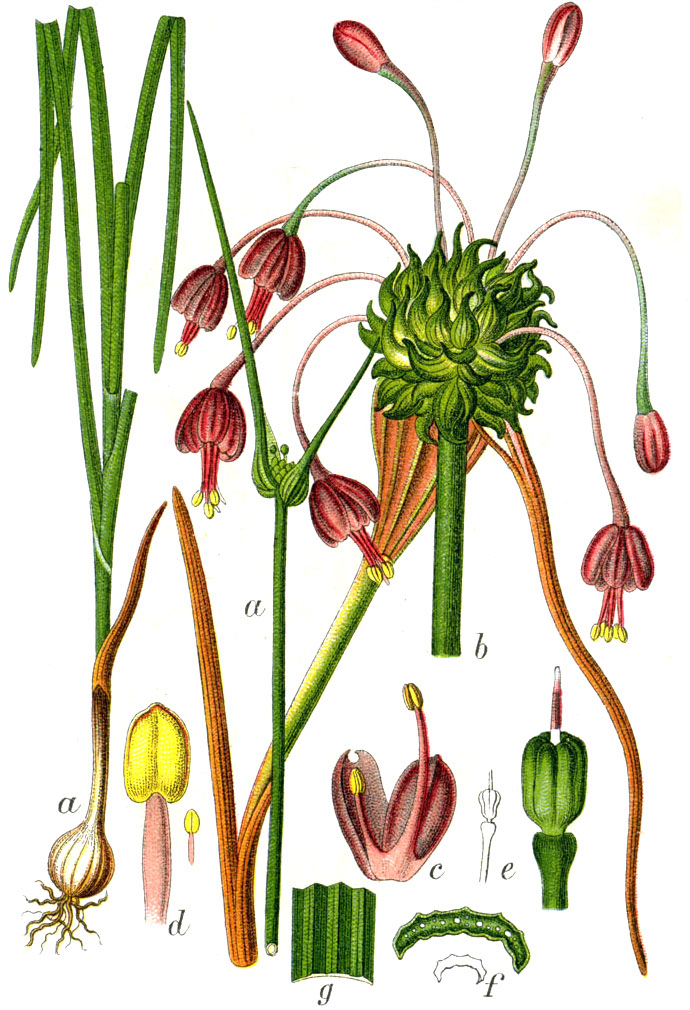 Allium carinatum L. s. l. Original Caption Kiel-Lauch, Allium carinatum